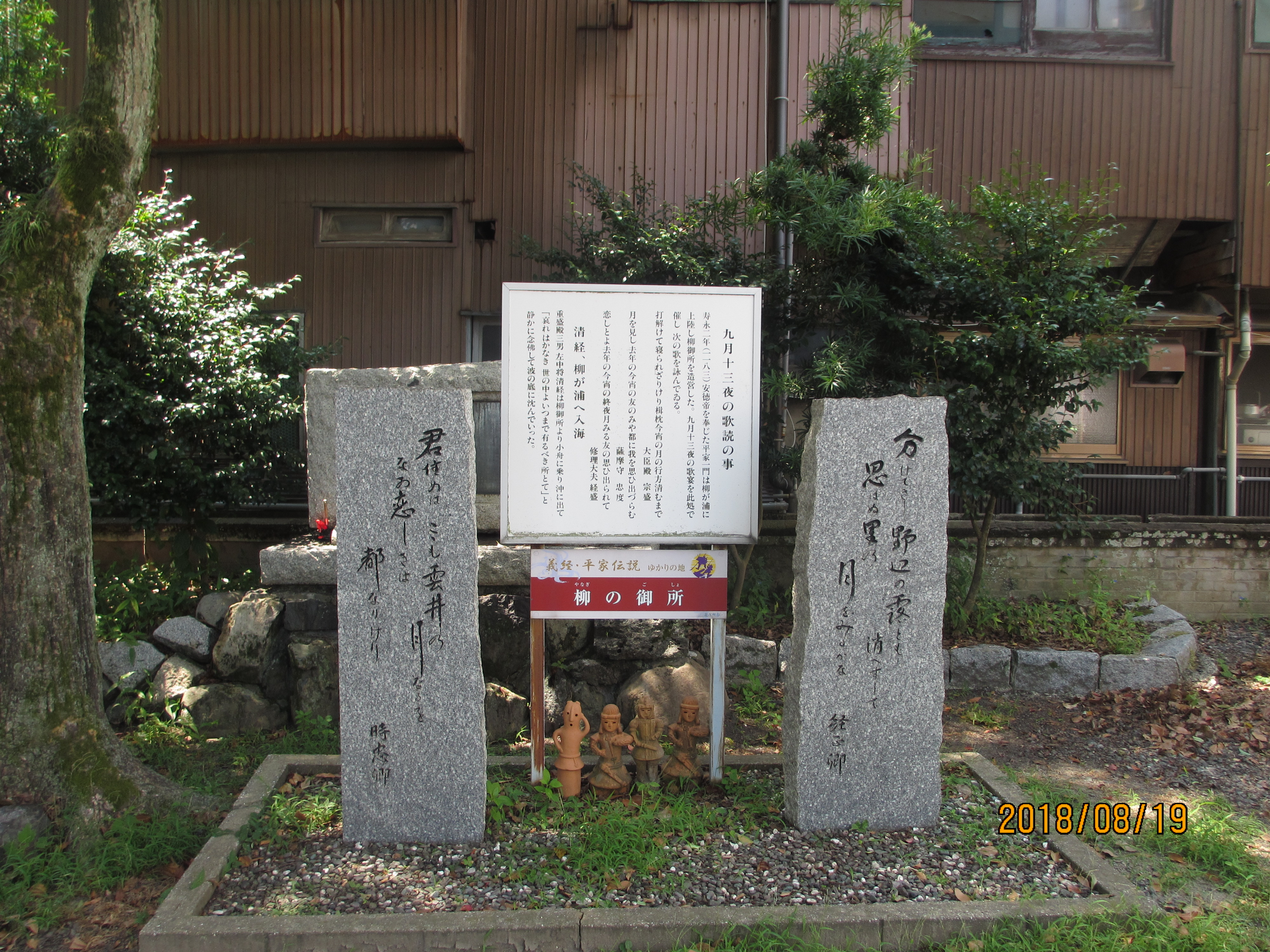 門司柳御所右手